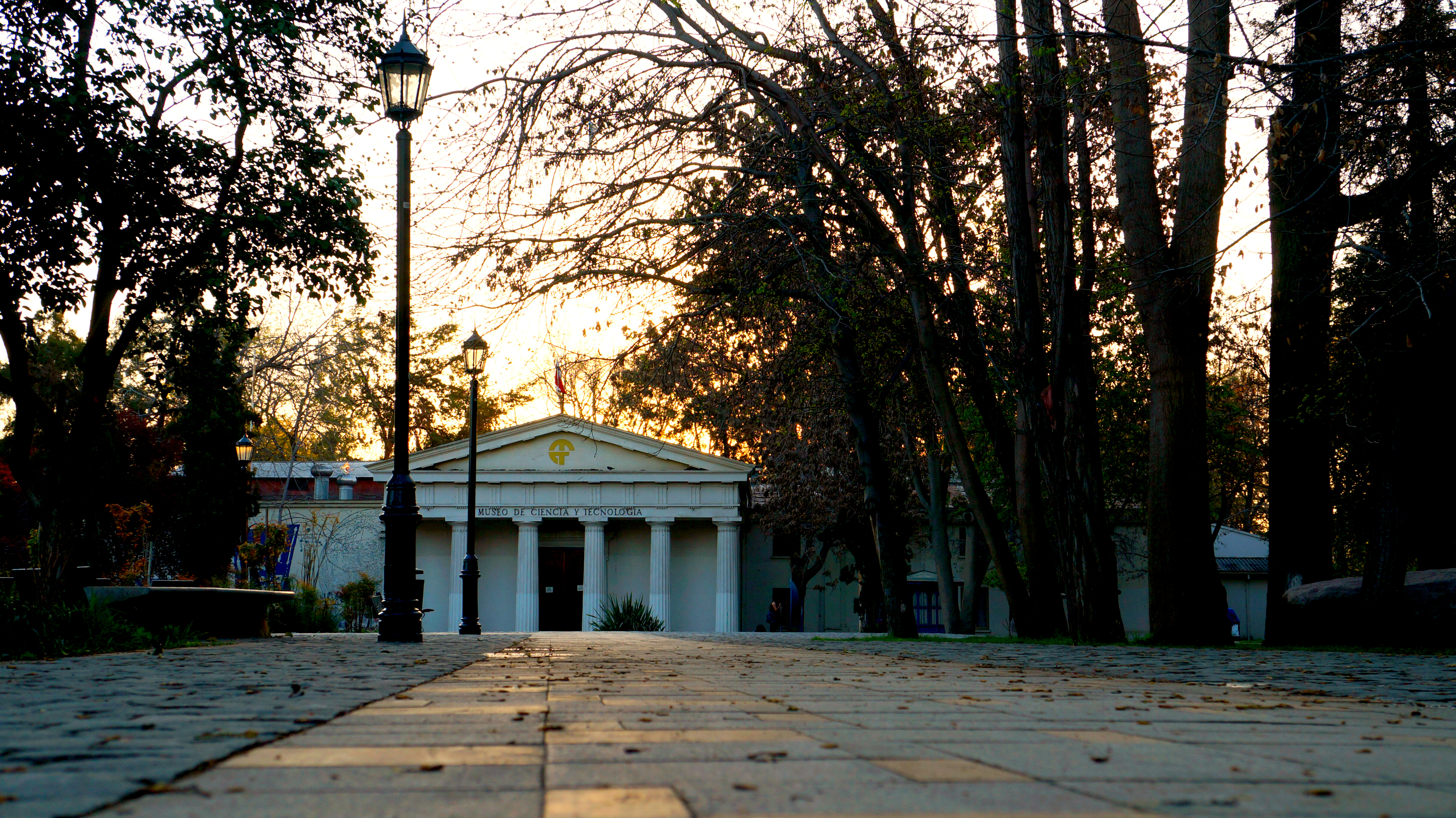 Parque Quinta Normal This is a photo of a national monument in Chile: 136